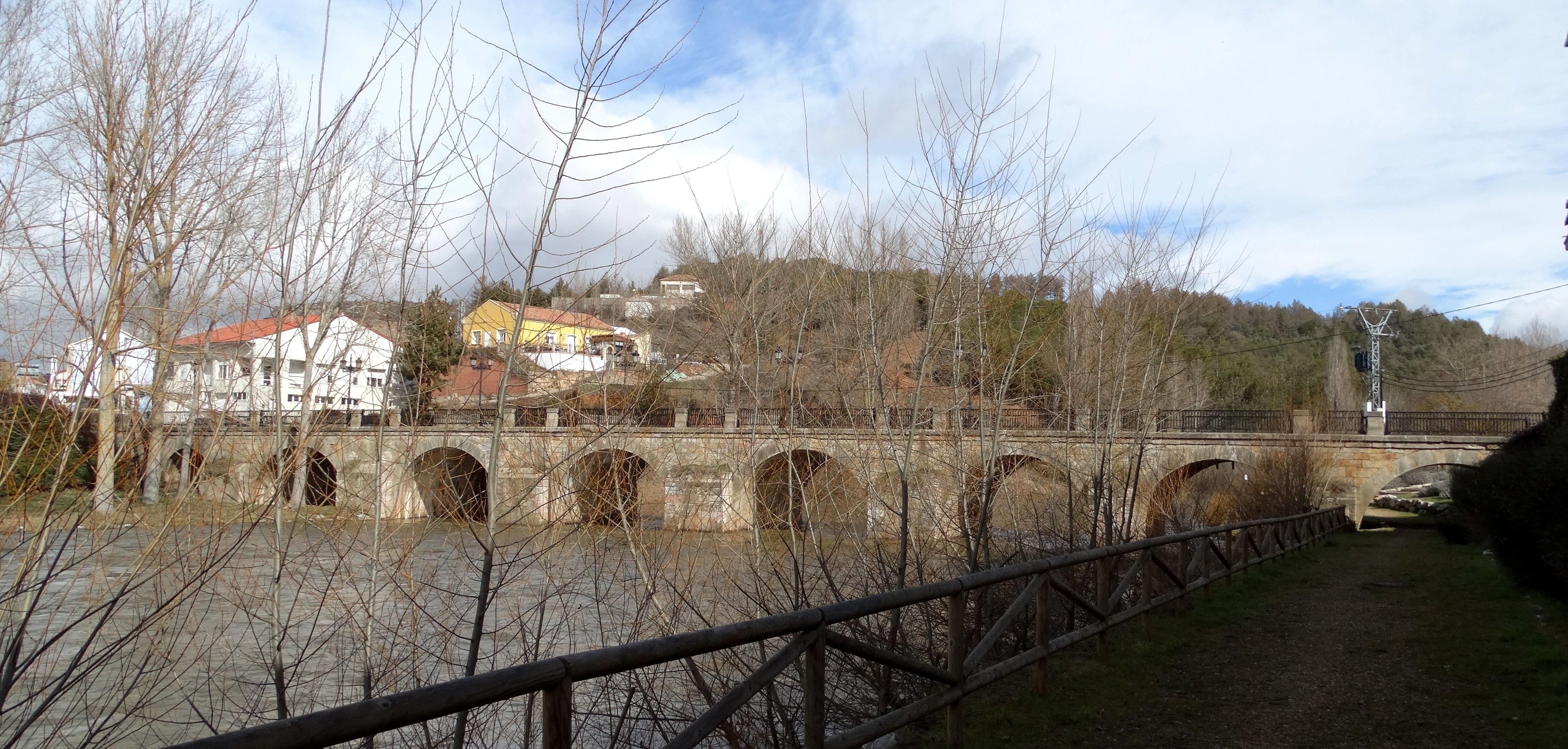 Puente de las Monjas sobre el río Pisuerga